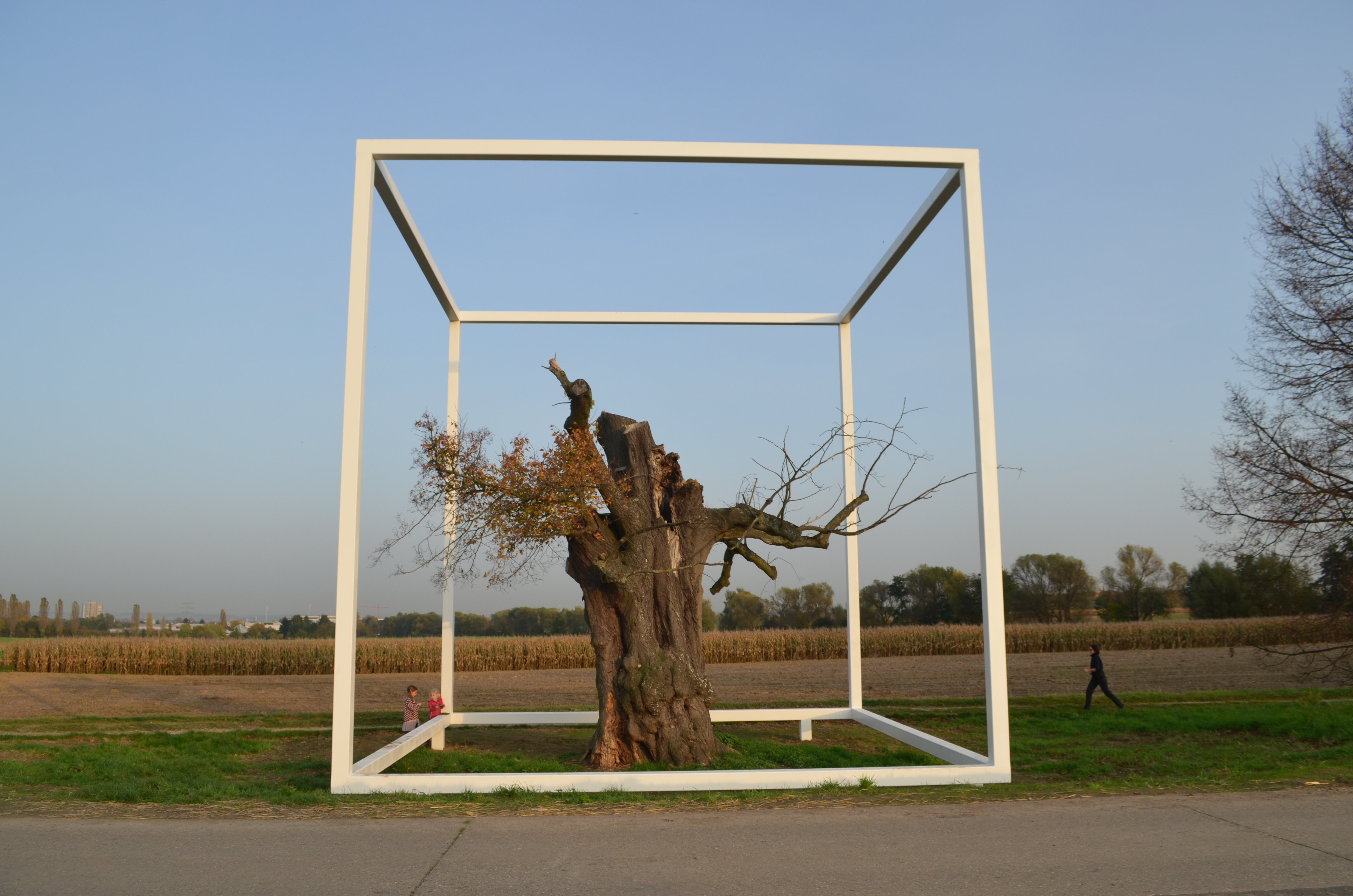 Oberursel, Linde im Mittelstedter Feld mit Kunst